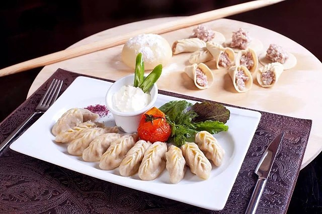 Процесс приготовление Гюрзы, сфотографировано в ресторане